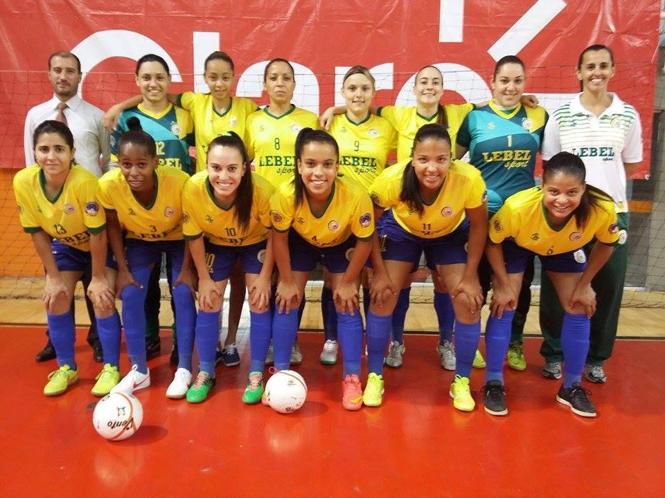 Seleção Brasileira de Futebol de Salão CNFS no Sul_Americano de Cali na Colômbia em 2015.